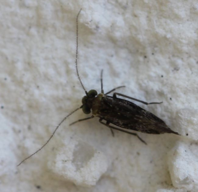 Loensia variegata am 3.6.2017 in Oftersheim